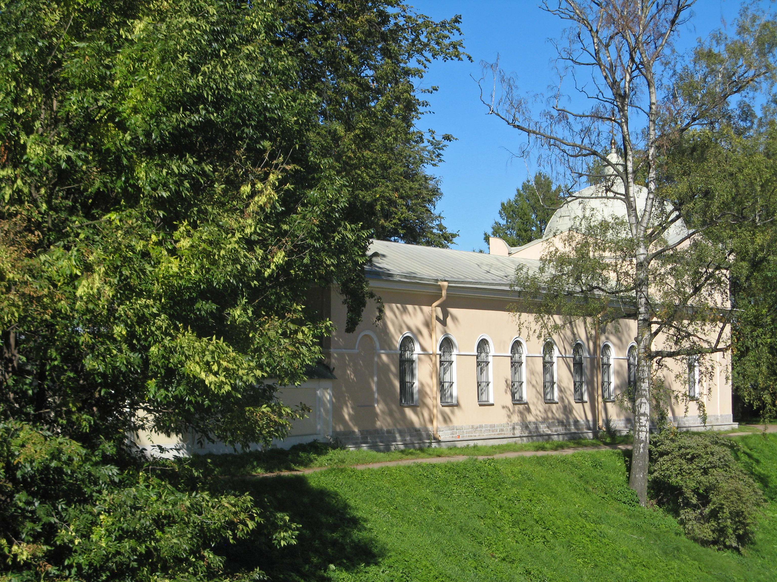 Церковь святого праведного Лазаря с усыпальницей: площадь Александра Невского, 1Б, Центральный район, Санкт-Петербург